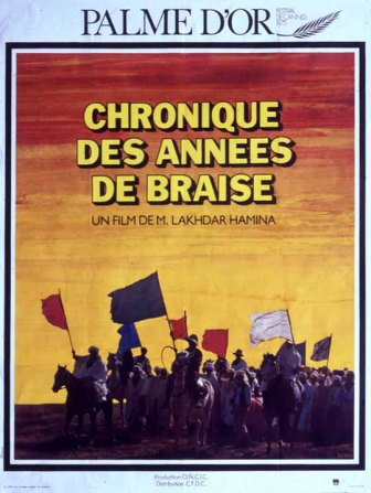 Affiche du film "Chronique des années de braise" de Lakhdar Hamina, réalisé en 1975.